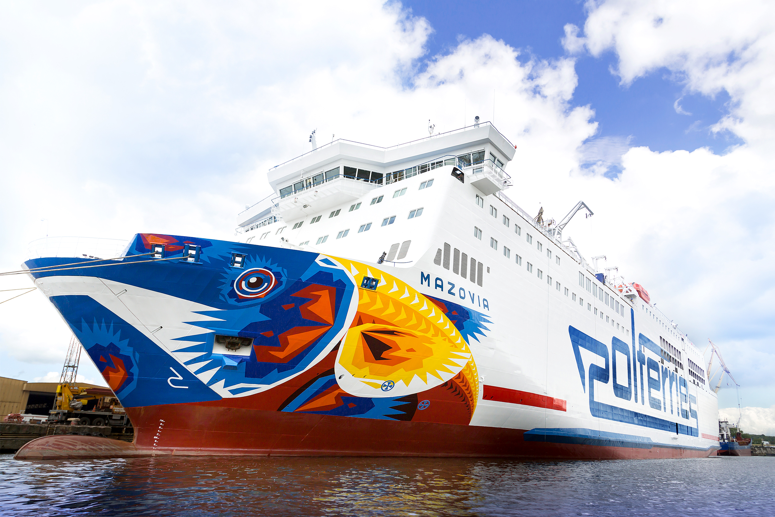 Mazovia